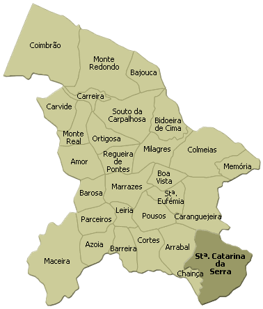 localisation de santa catarina da serra sur la freguesia de leiria